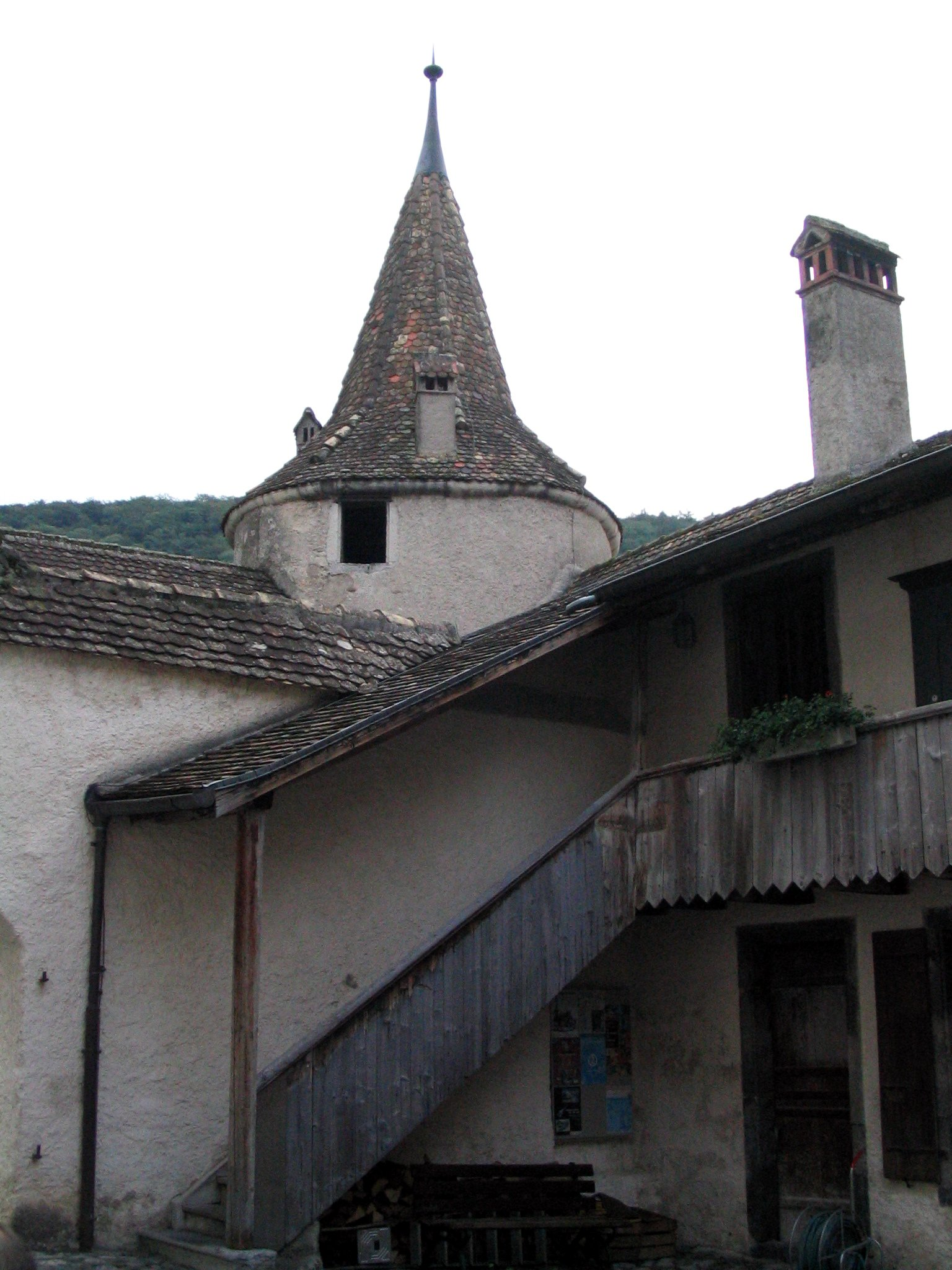 Château d'Aigle - Switzerland